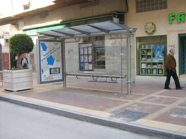 Parada código 307 de la EMT de Málaga